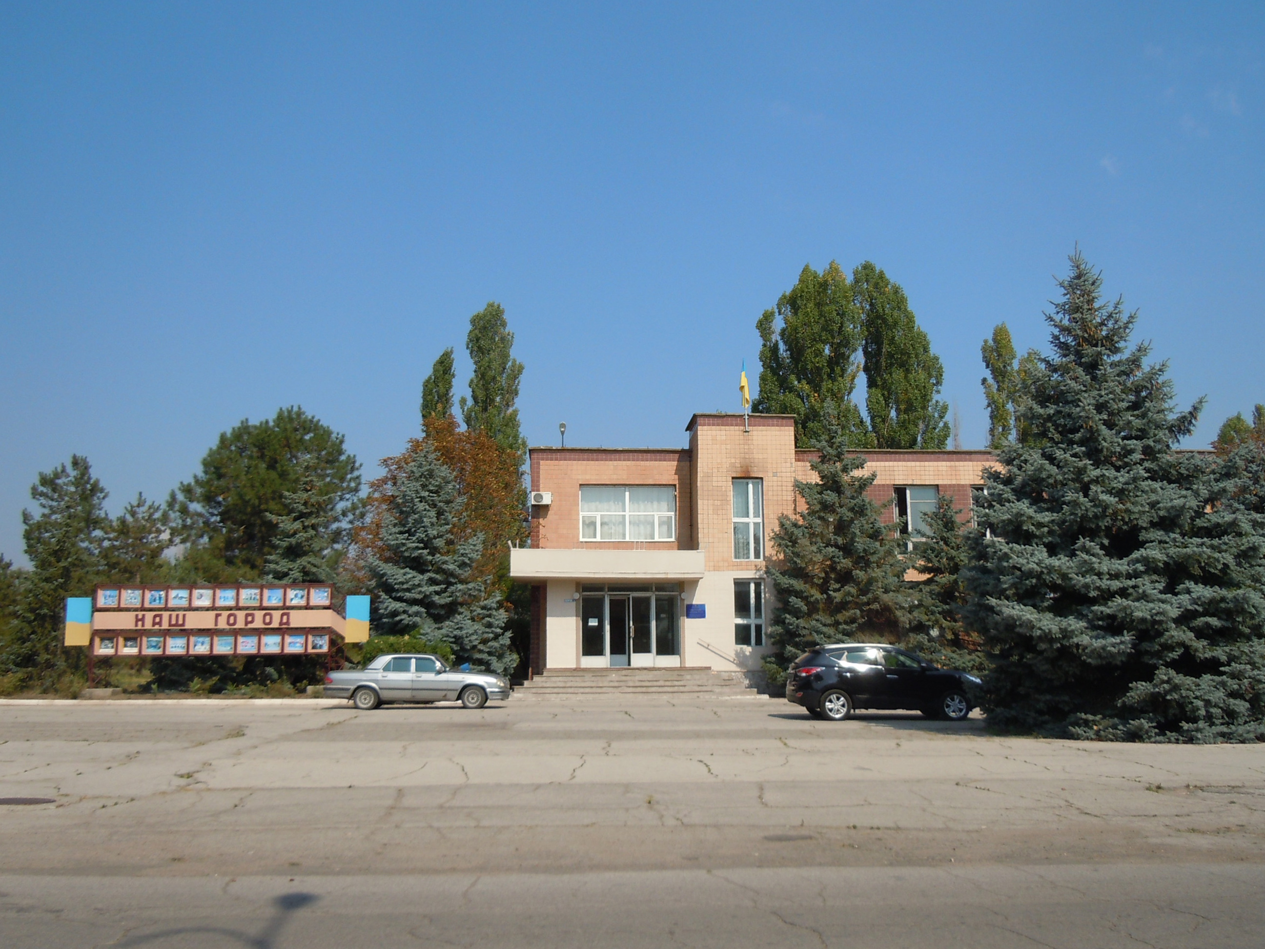 Селищна рада Сергіївки